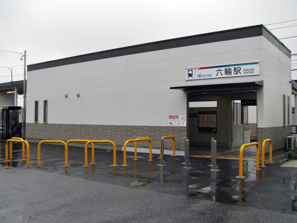 名鉄尾西線六輪駅